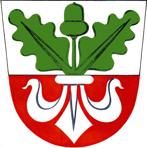 Znak obce Zástřizly